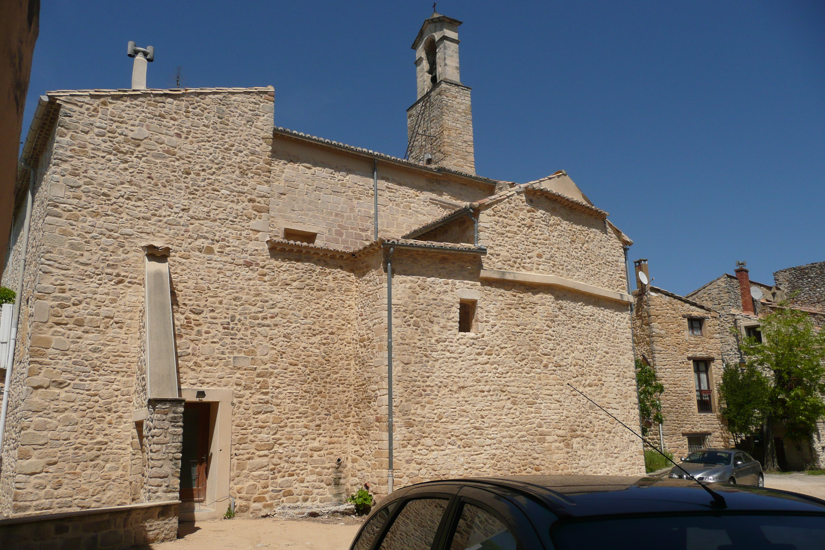 Eglise à Saint-Nazaire (Gard).